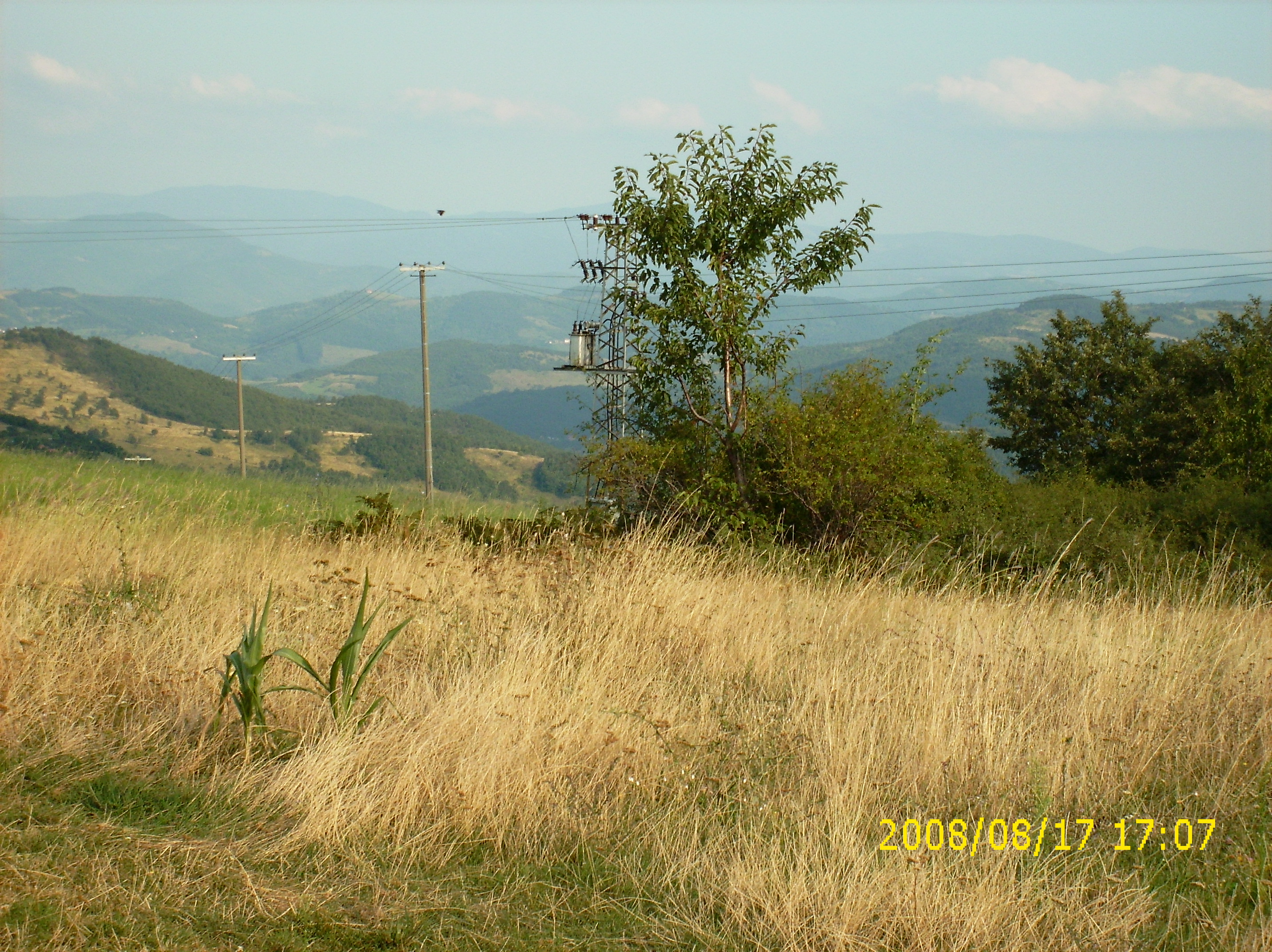 Slika MirnicaBlato.jpeg prikazuje jednu od visih tacaka u selu Mirnica. Slikano 2008. god privatnim aparatom. Slika je dostupna svim ljudima dobre volje, bez naknade. Autor: Zvonko Radosavljevic